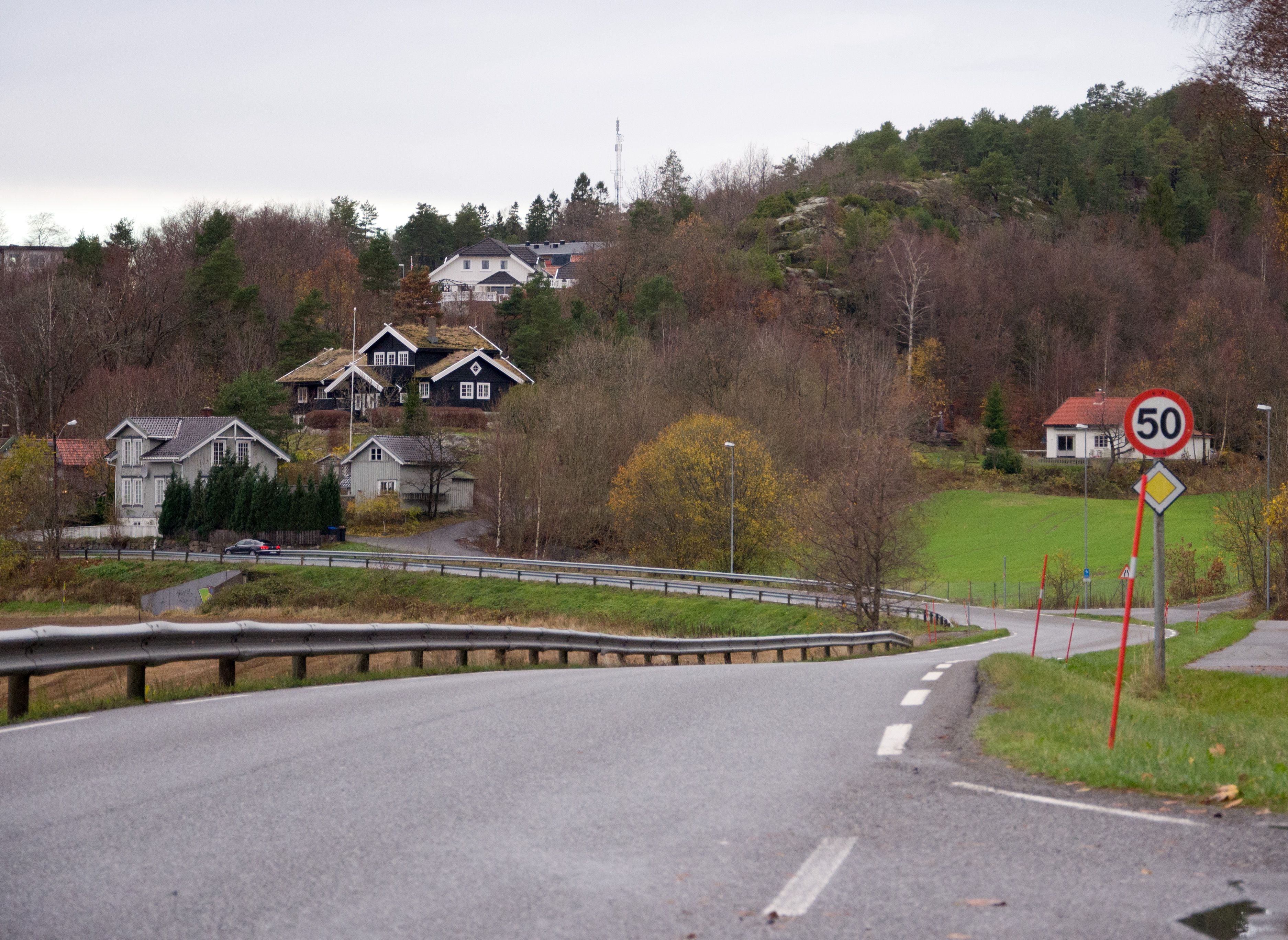 Vestfolds fylkesvei 260 Vesterøyveien